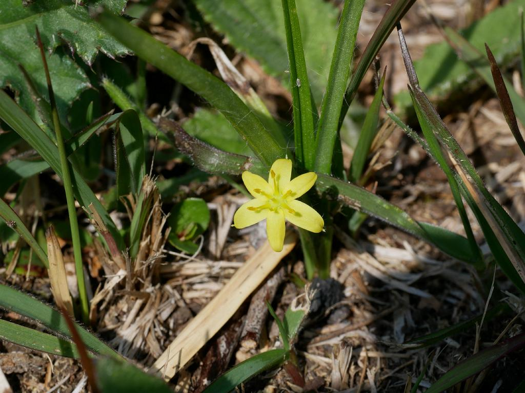 2019/04/22 宮崎県川南湿原：Kawaminami, Miyazaki Pref. Japan